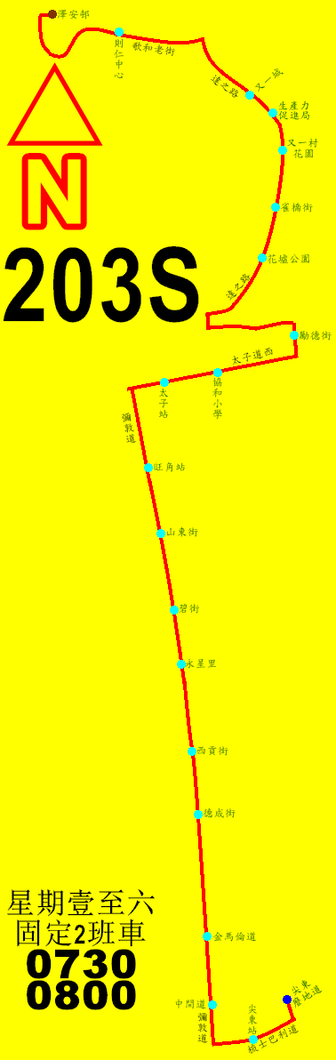 中文（香港）: 九巴203S線的走線圖